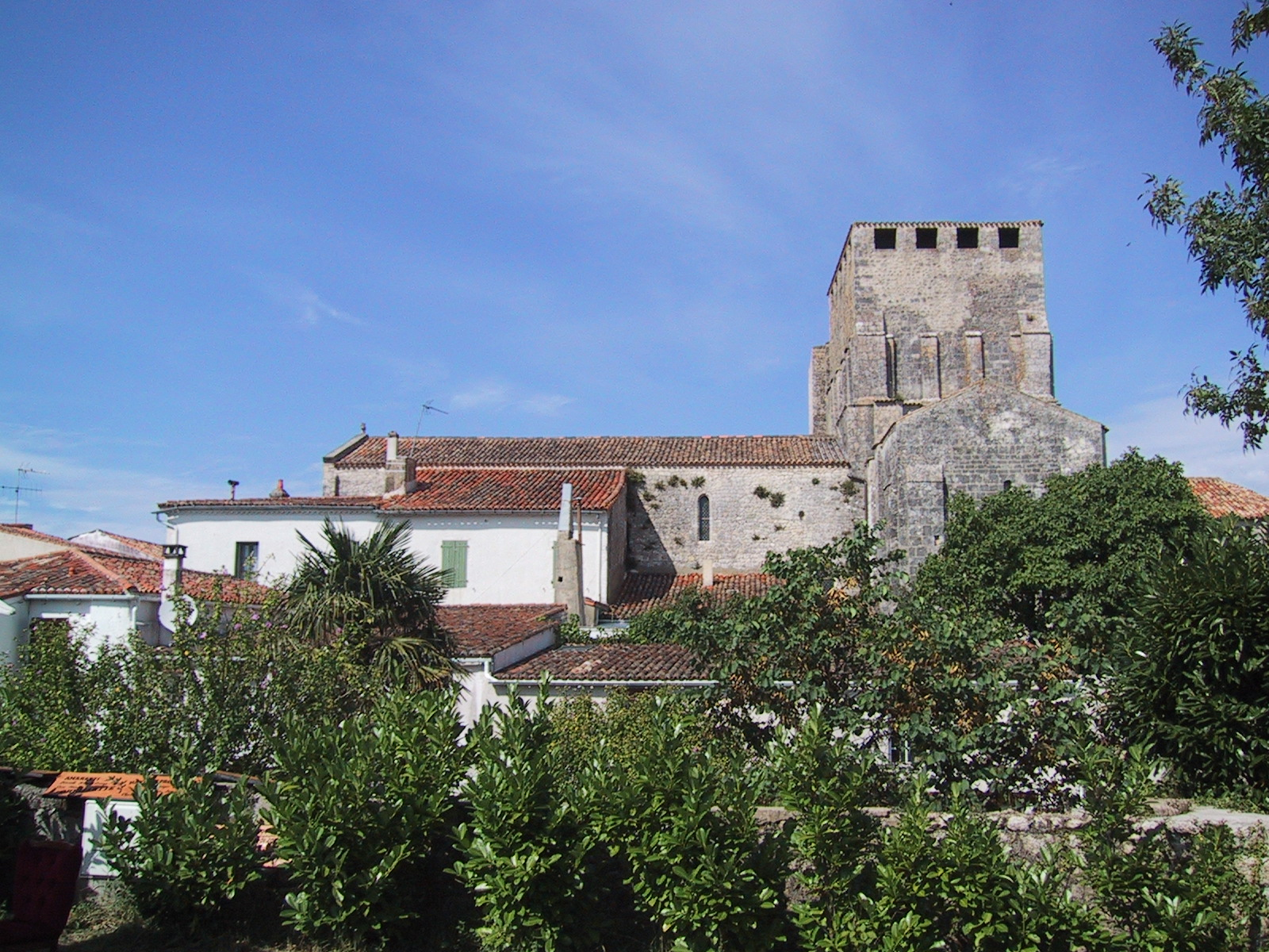 Mornac-sur-Seudre, Charente-maritime (17), Poitou-Charentes, France. Classé parmi les " Plus Beaux Villages de France ". Eglise Saint Pierre, église fortifiée du XIe siècle.